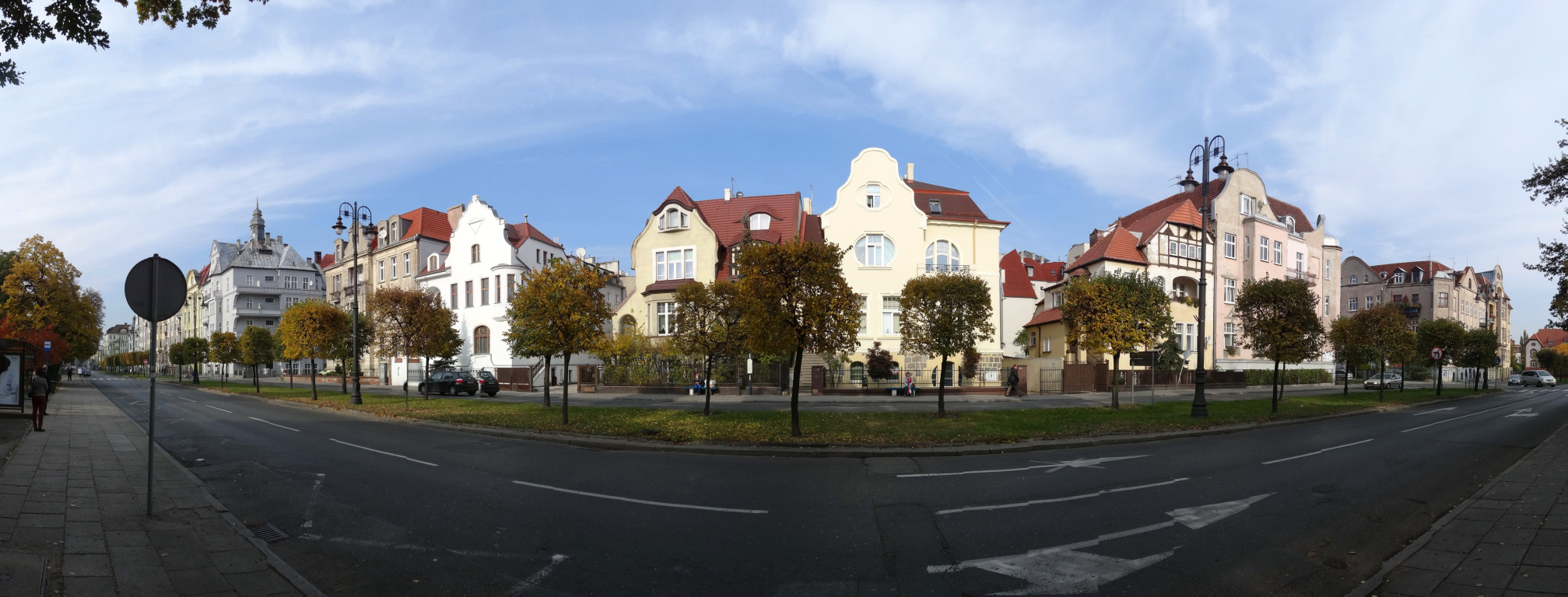 Północna pierzeja alei Adama Mickiewicza w Bydgoszczy